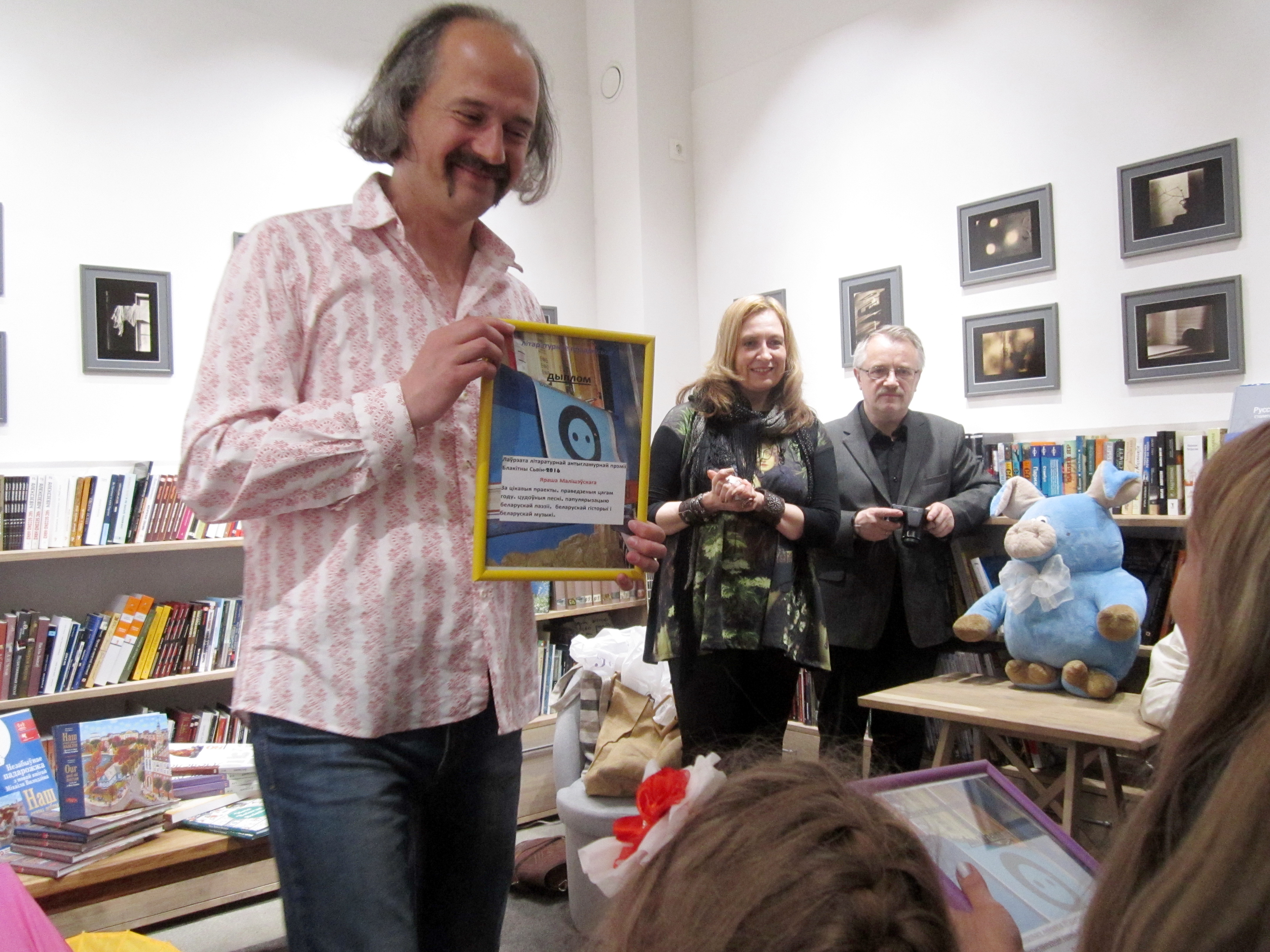 Узнагароджанне Яраша Малішэўскага літаратурнай прэміяй «Блакітны Свін — 2016»